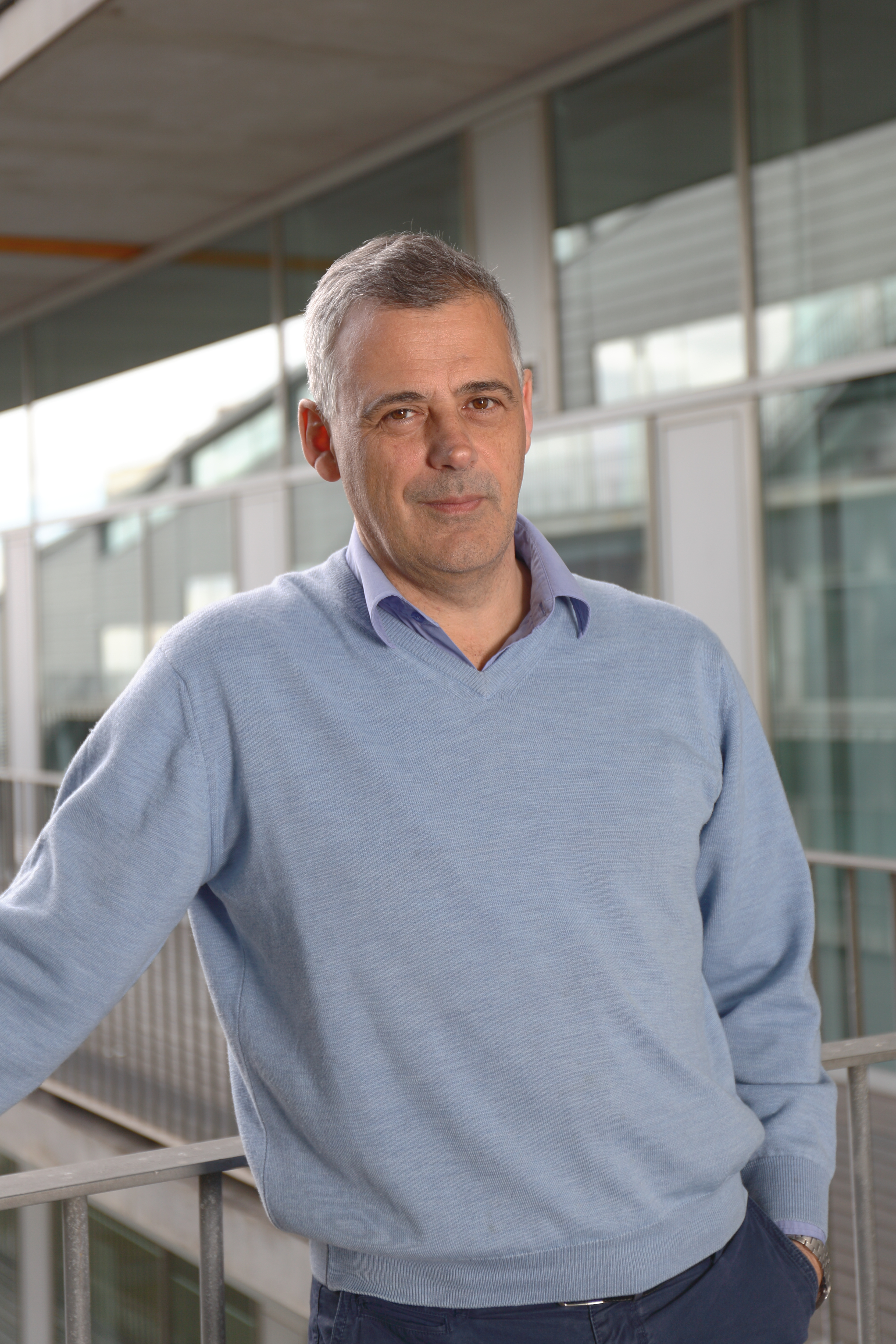 Retrato de Luis Serrano Pubull de 2015 en el PRBB